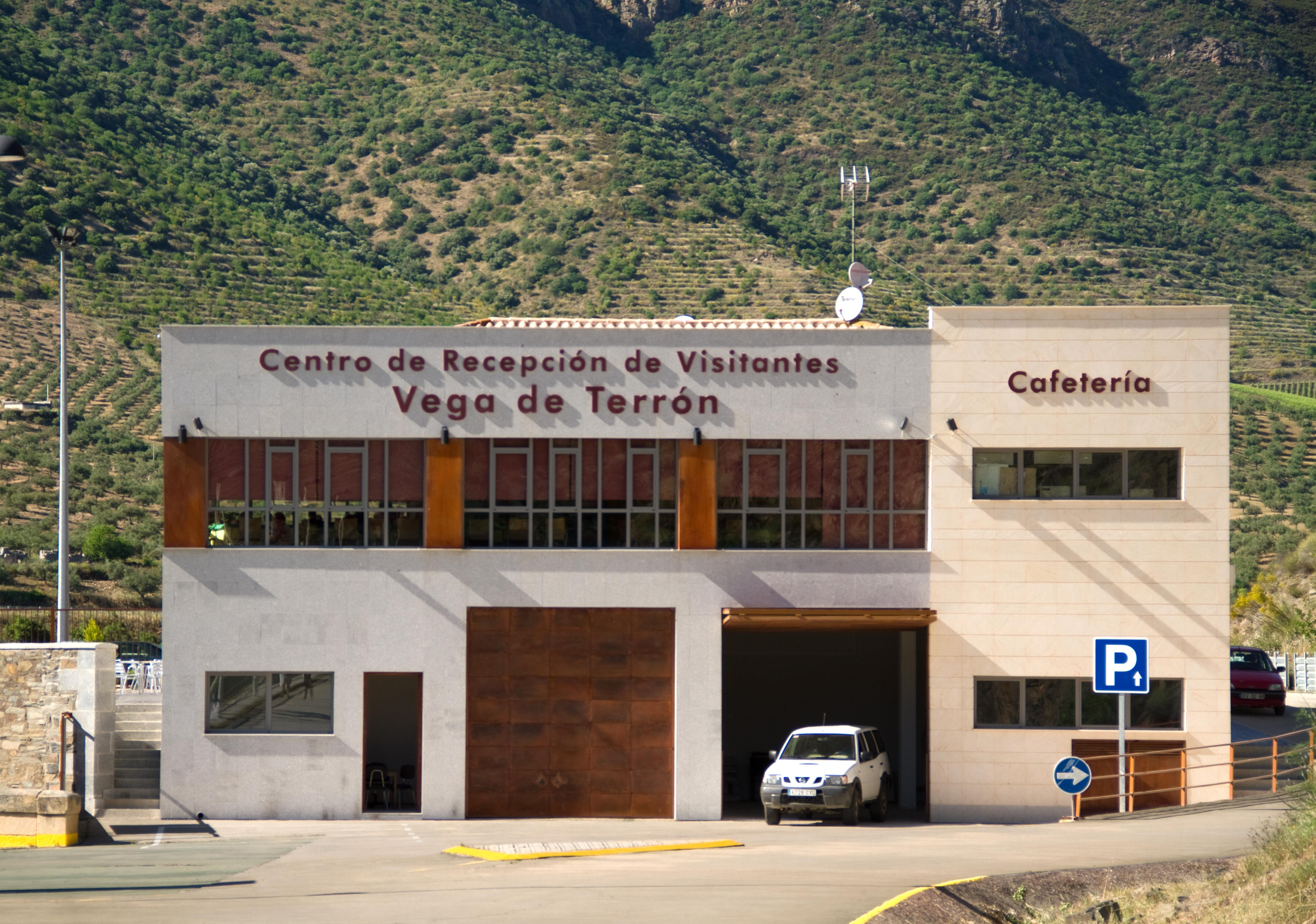 Centro de recepción de visitantes del Muelle de Vega Terrón, en La Fregeneda, Parque Natural de Arribes del Duero, España.